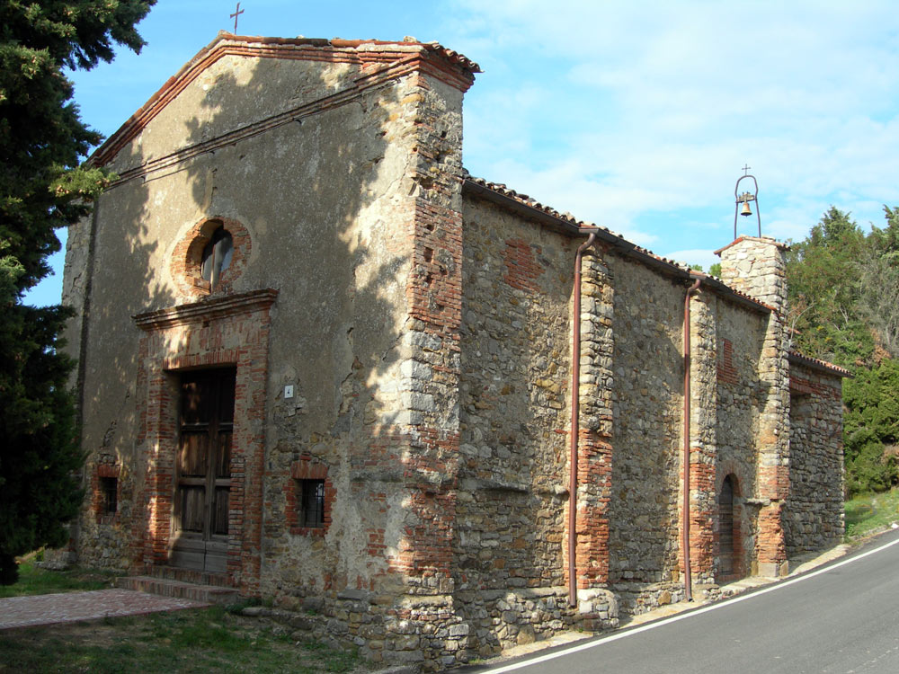 Vittorio Tarparelli / Chiesa comunale di Parrano (in provincia di Terni)